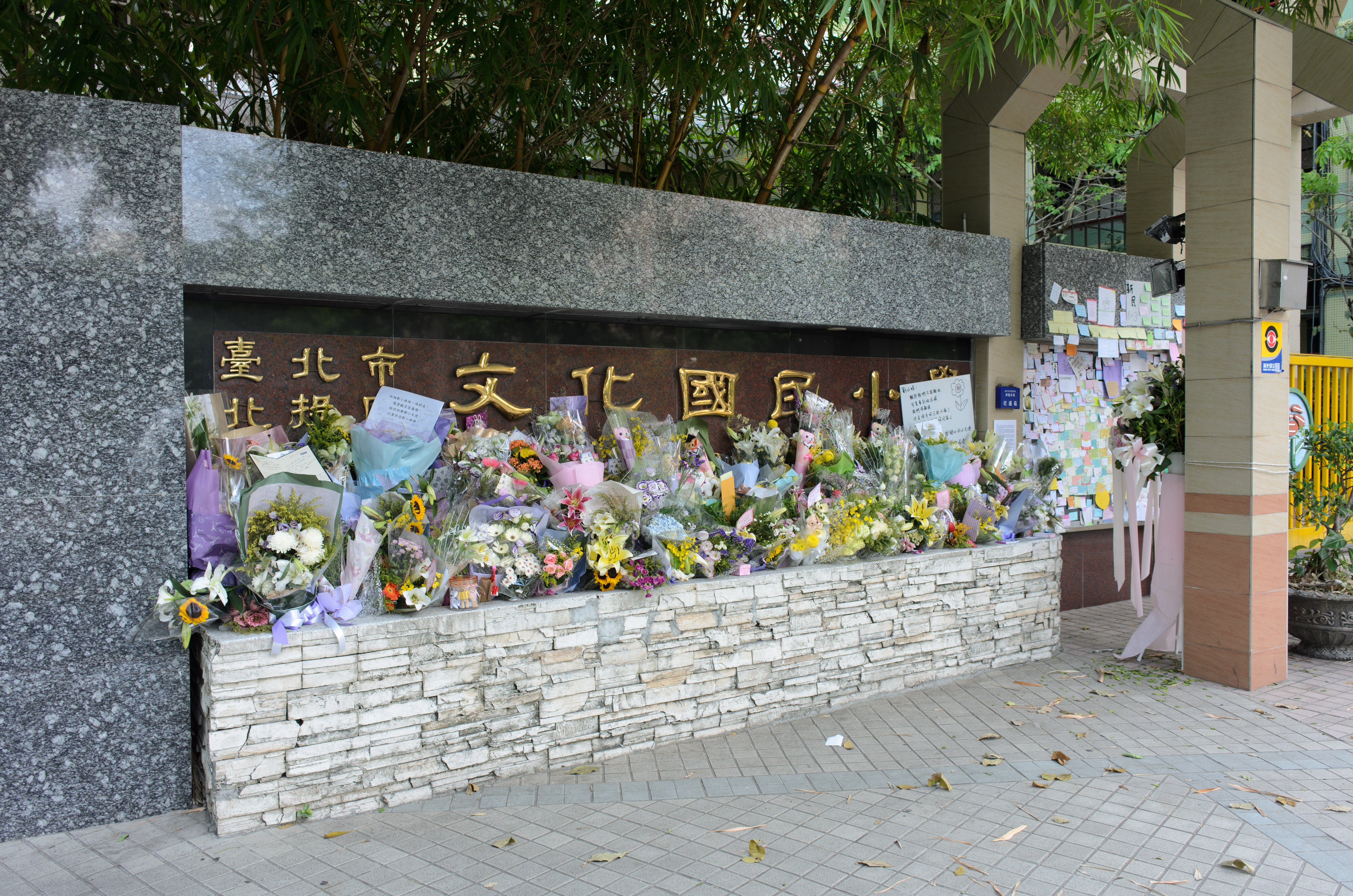 2015年6月3日，臺北市北投區文化國民小學正門旁悼念亡者劉氏的花束。